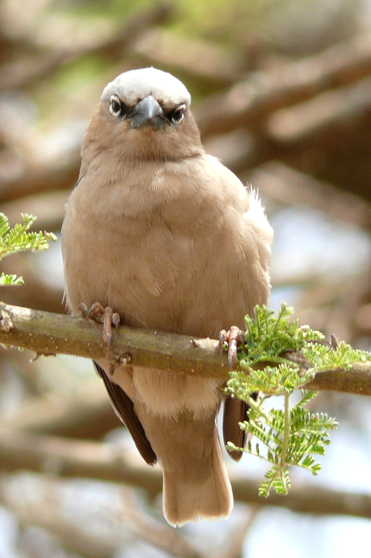 Marmorspätzling (Pseudonigrita arnaudi) (Bonaparte, 1850) in Serengeti